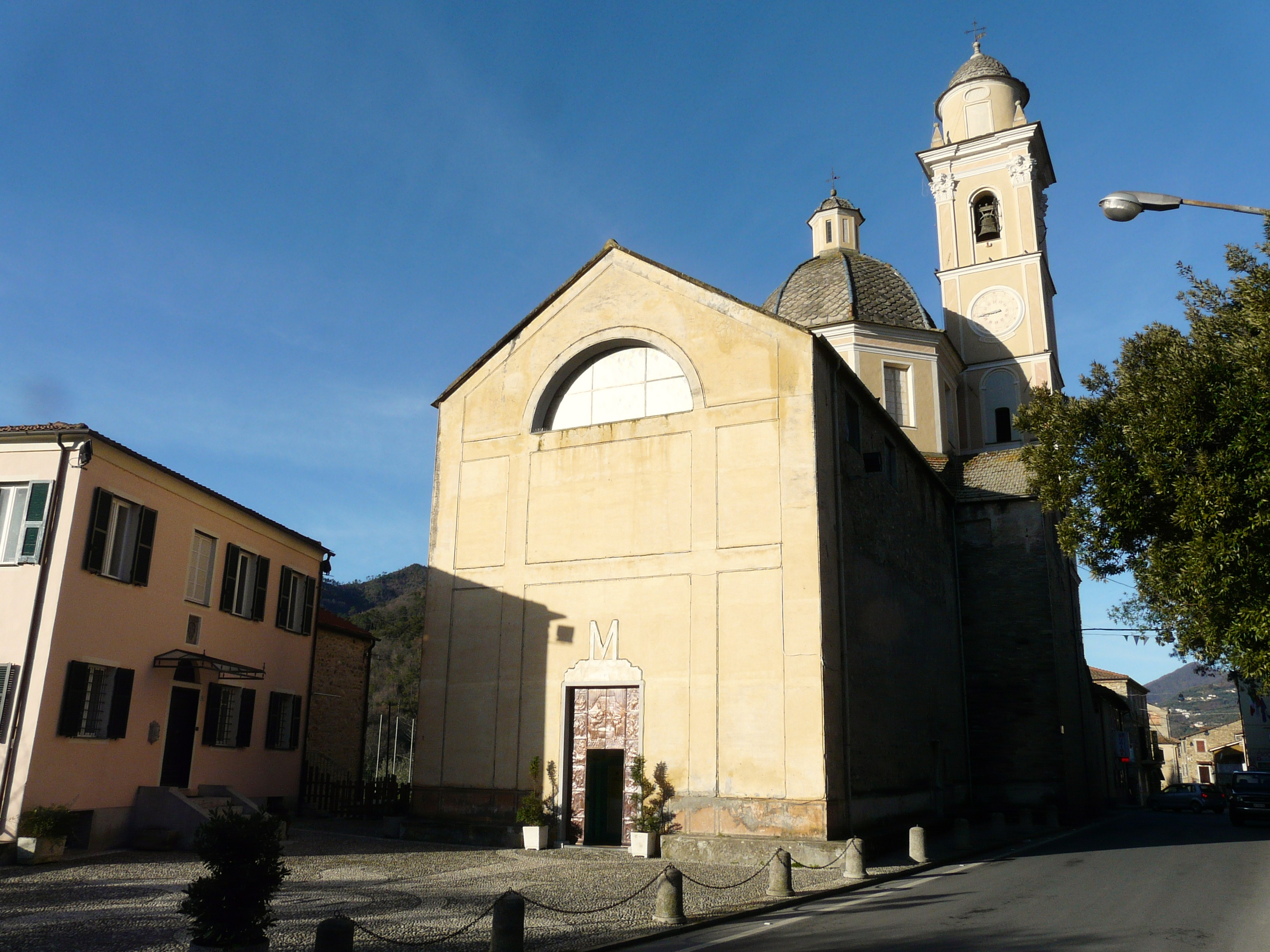 Chiesa della Natività, Garlenda, Liguria, Italia